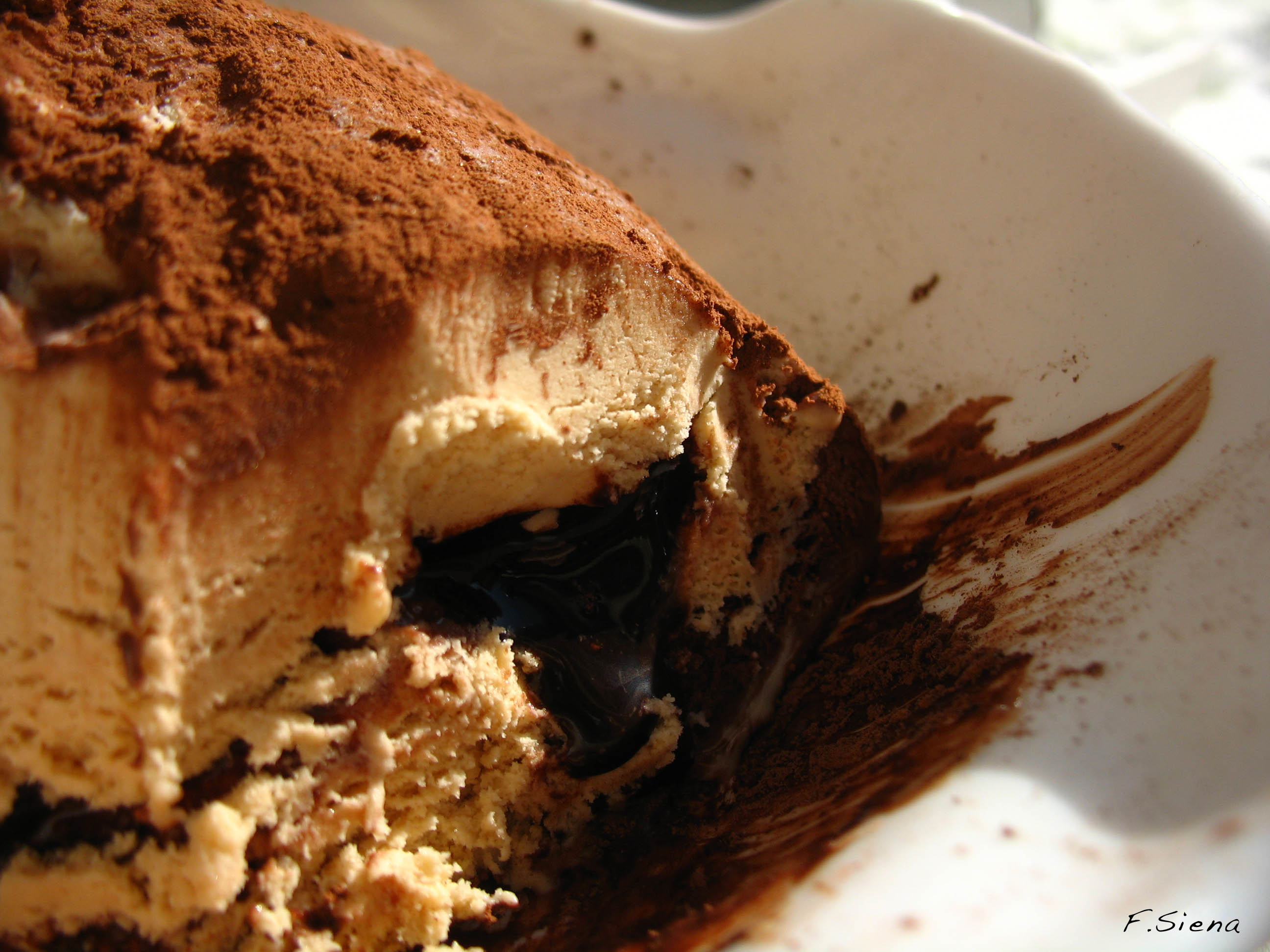 Il tartufo di Pizzo è un antico prodotto tipico della pasticceria calabrese – Italia.